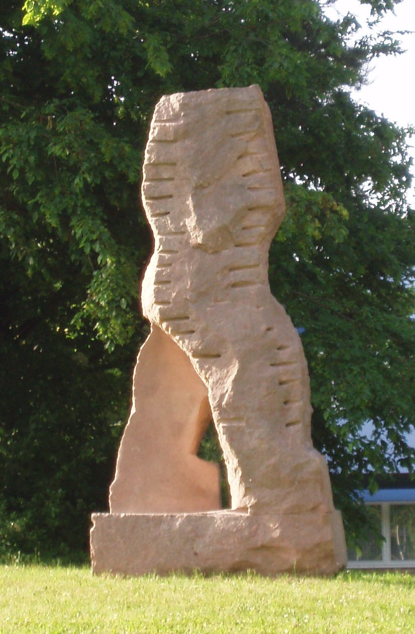 Skulptur Der grosse Gehende (1993) by Georg Ahrens am Schwanenteich in Kandel